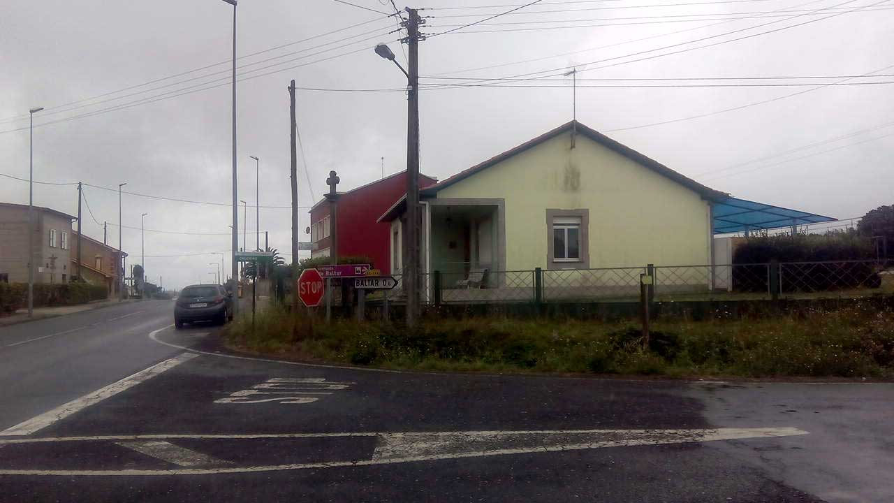 Vista do Cruceiro, O Val.